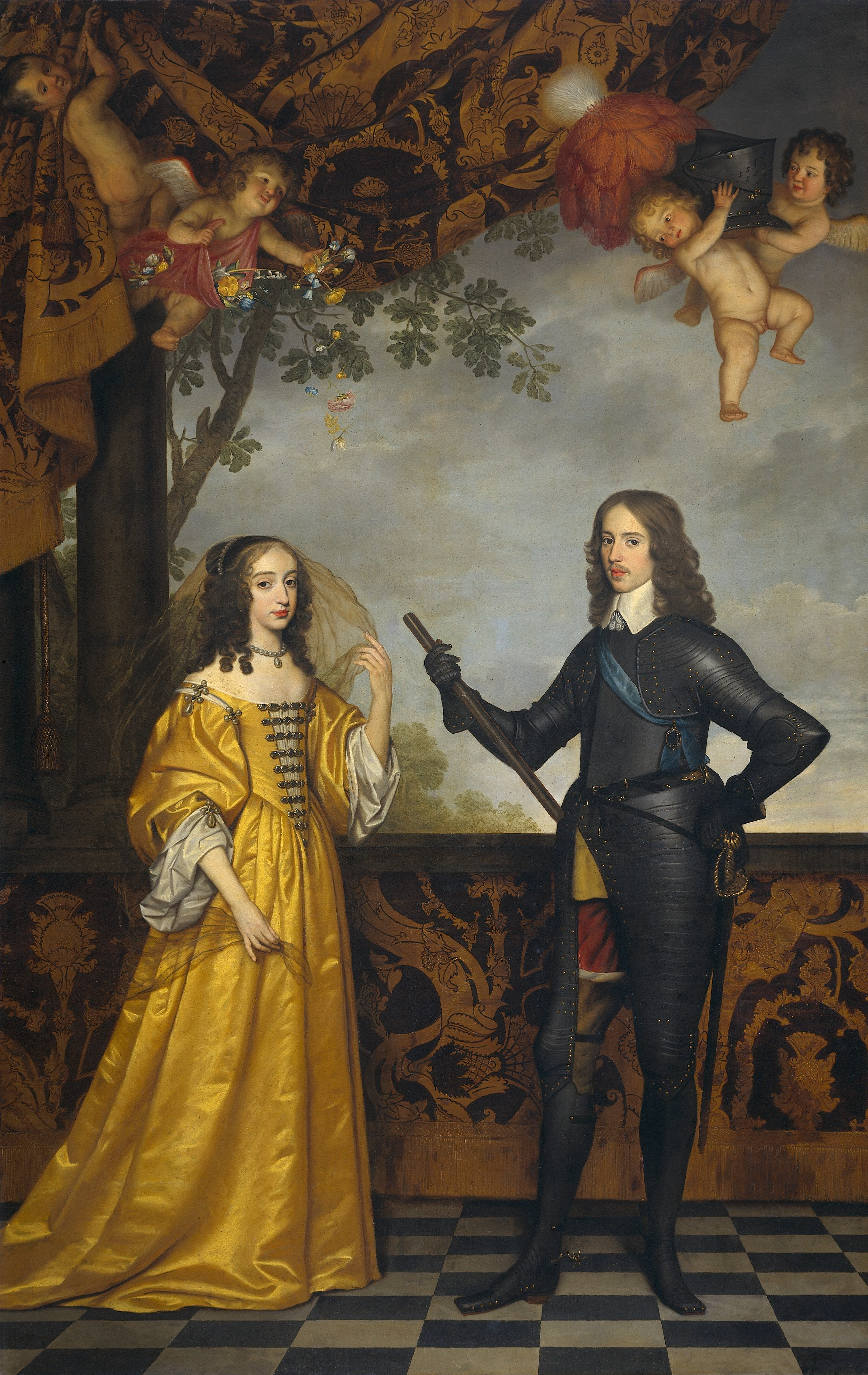 Part of a series, together with File:Gerrit van Honthorst - Portret van Friedrich Wilhelm I, keurvorst van Brandenburg (1620-1688) en zijn echtgenote Louise Henriette van Nassau (1627-1667) Rijksmuseum.jpg and File:Gerrit van Honthorst - Frederik Hendrik met familie.jpg.